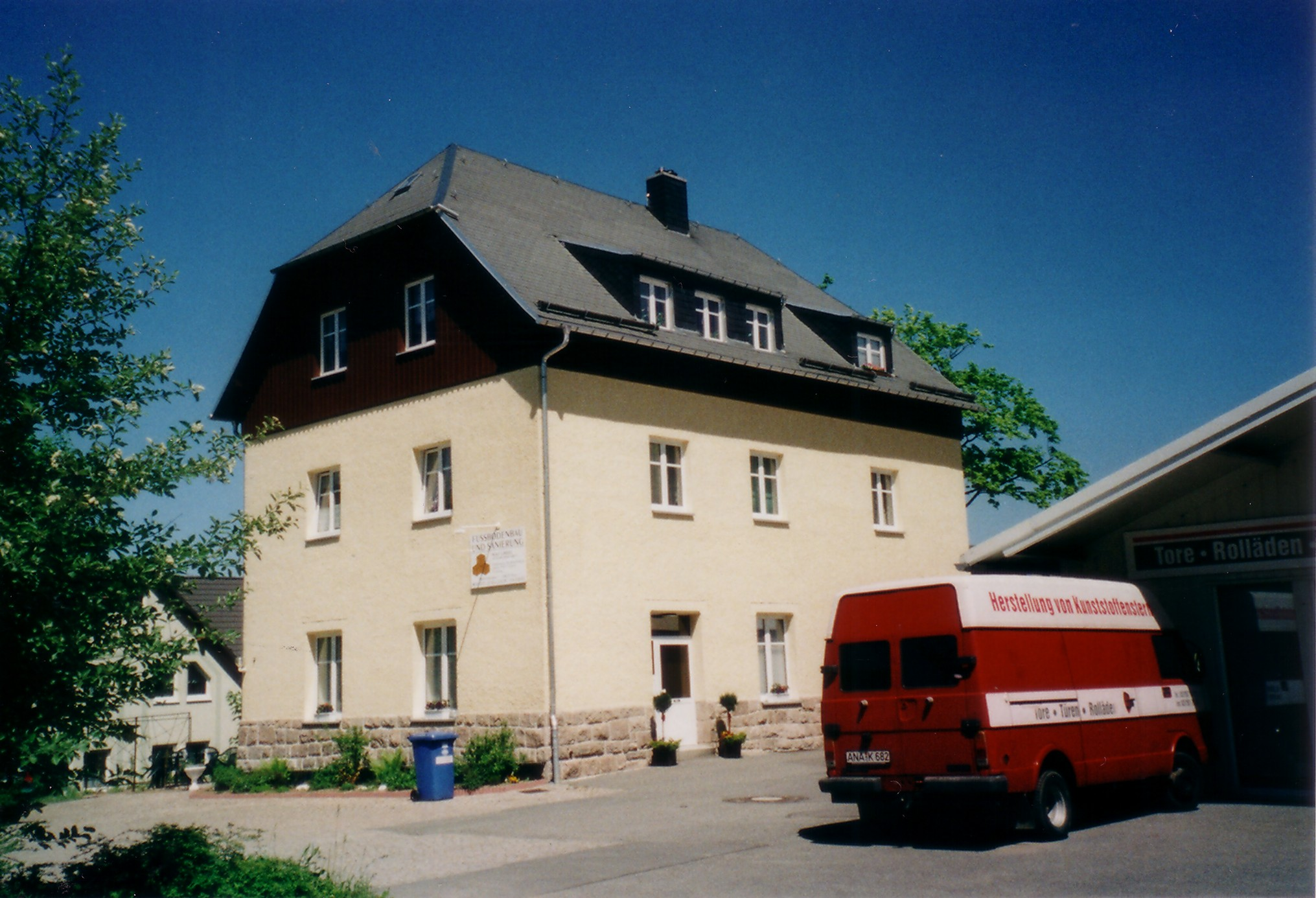 Das ehemalige Empfangsgebäude des Bahnhofs Thum